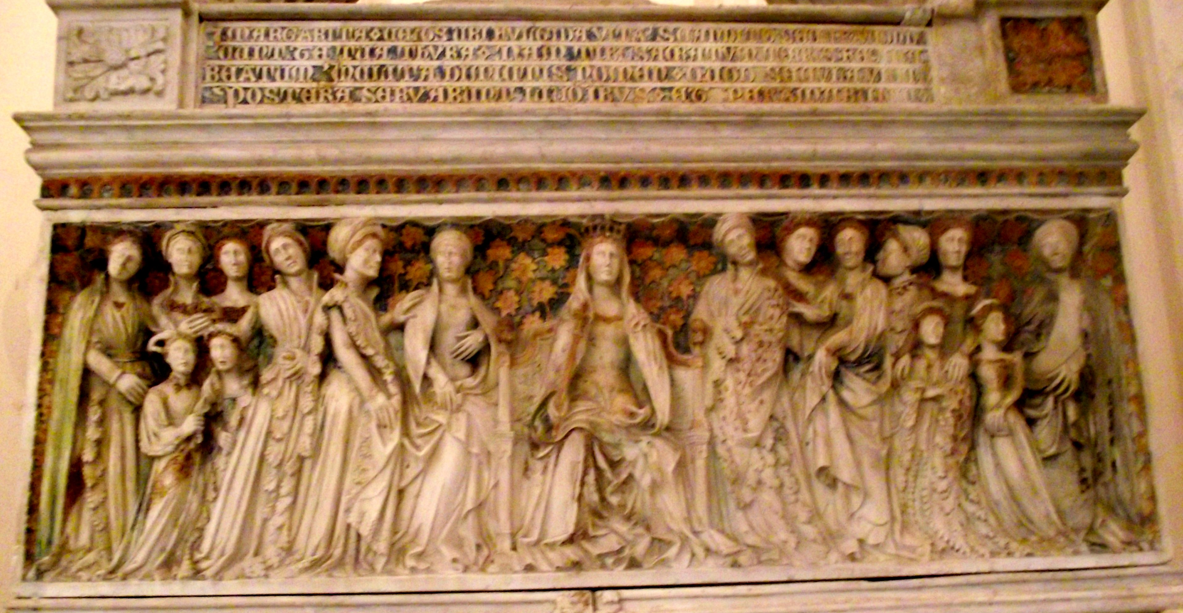 Durazzói Margit síremlékének részlete, Salerno, Olaszország